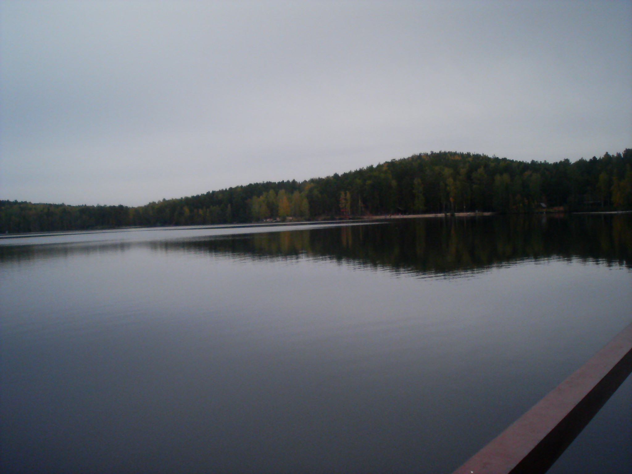 Песчаное озеро с южного пирса